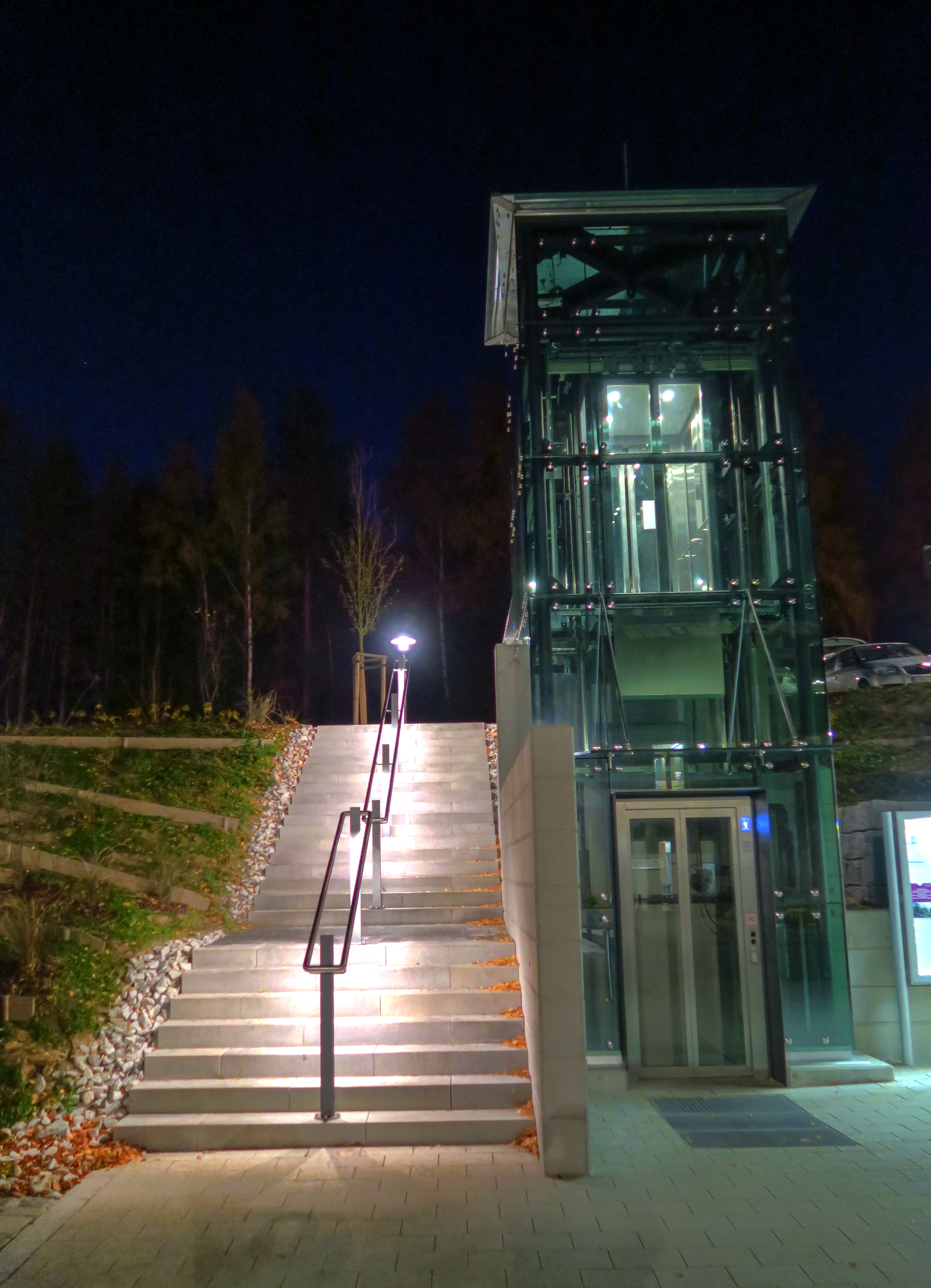 Deutschland, Bayern, Regierungsbezirk Oberpfalz, Landkreis Tirschenreuth, Neualbenreuth, Sibyllenbad, Außenaufzug von der Eingangsebene auf die Parkebene